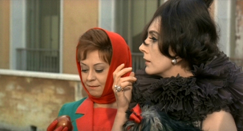 Képkocka a „Júlia és a szellemek” című filmből